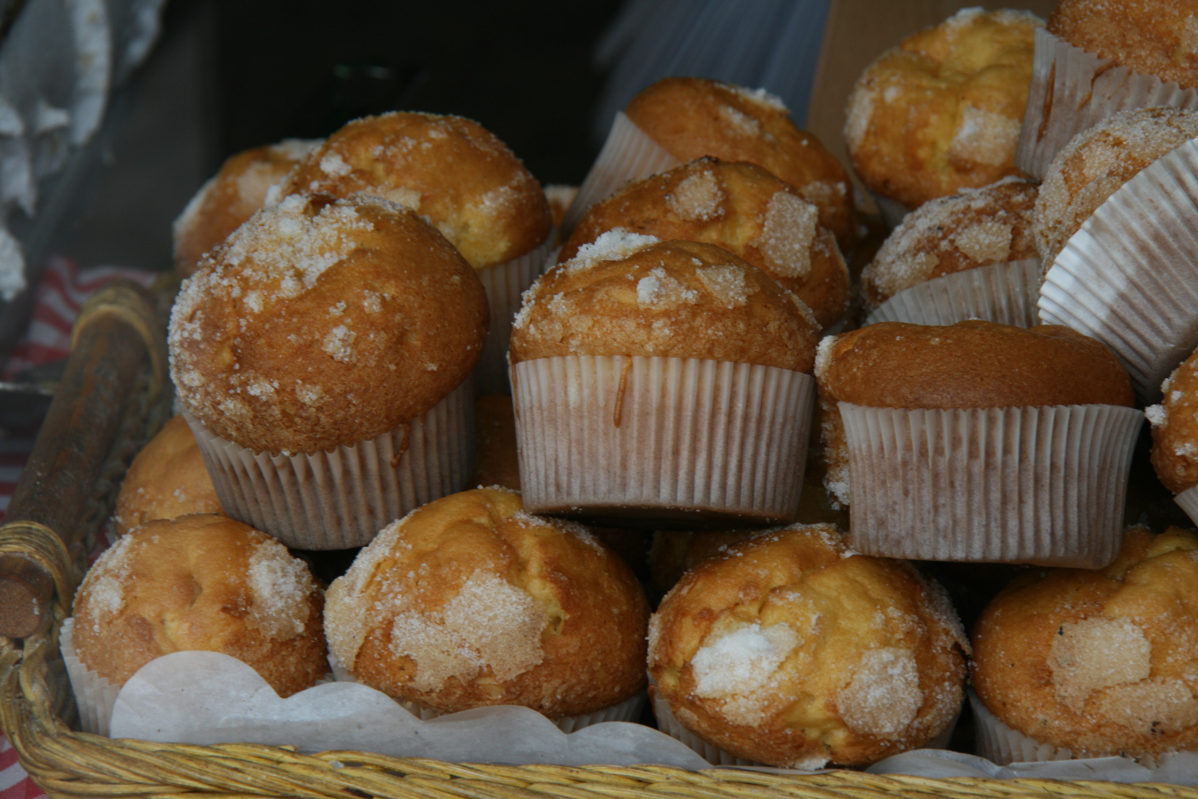 Magdalenas